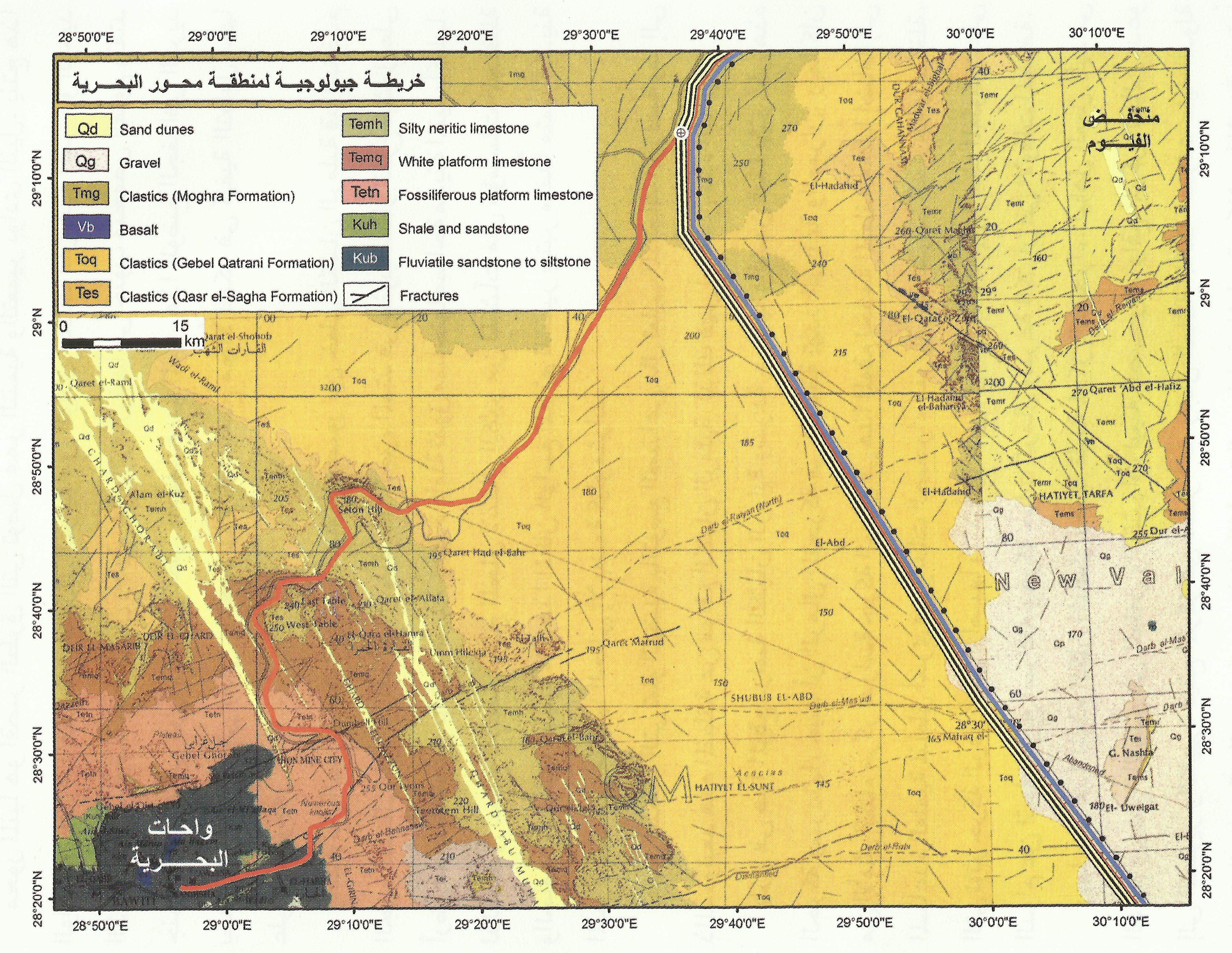 محور تعمير البحرية